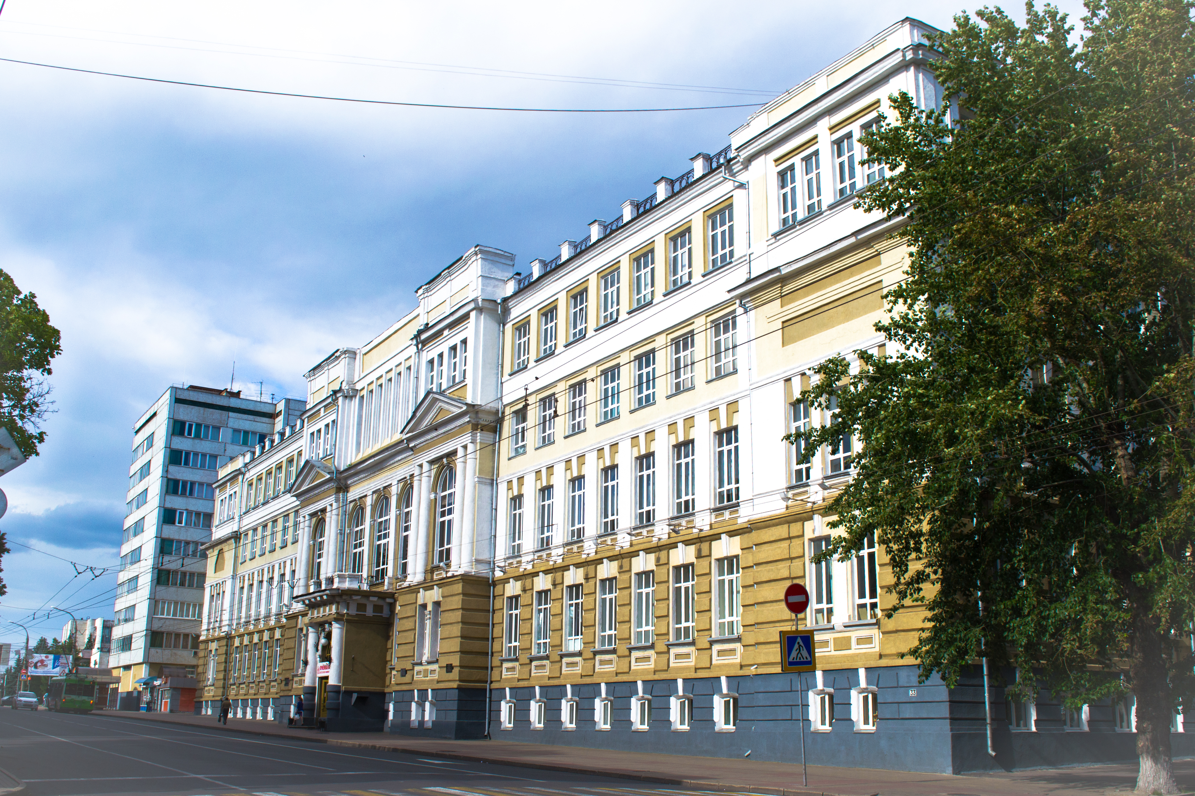 Здание мариинской женской гимназии: улица Радищева, 33, Курск, Курская область